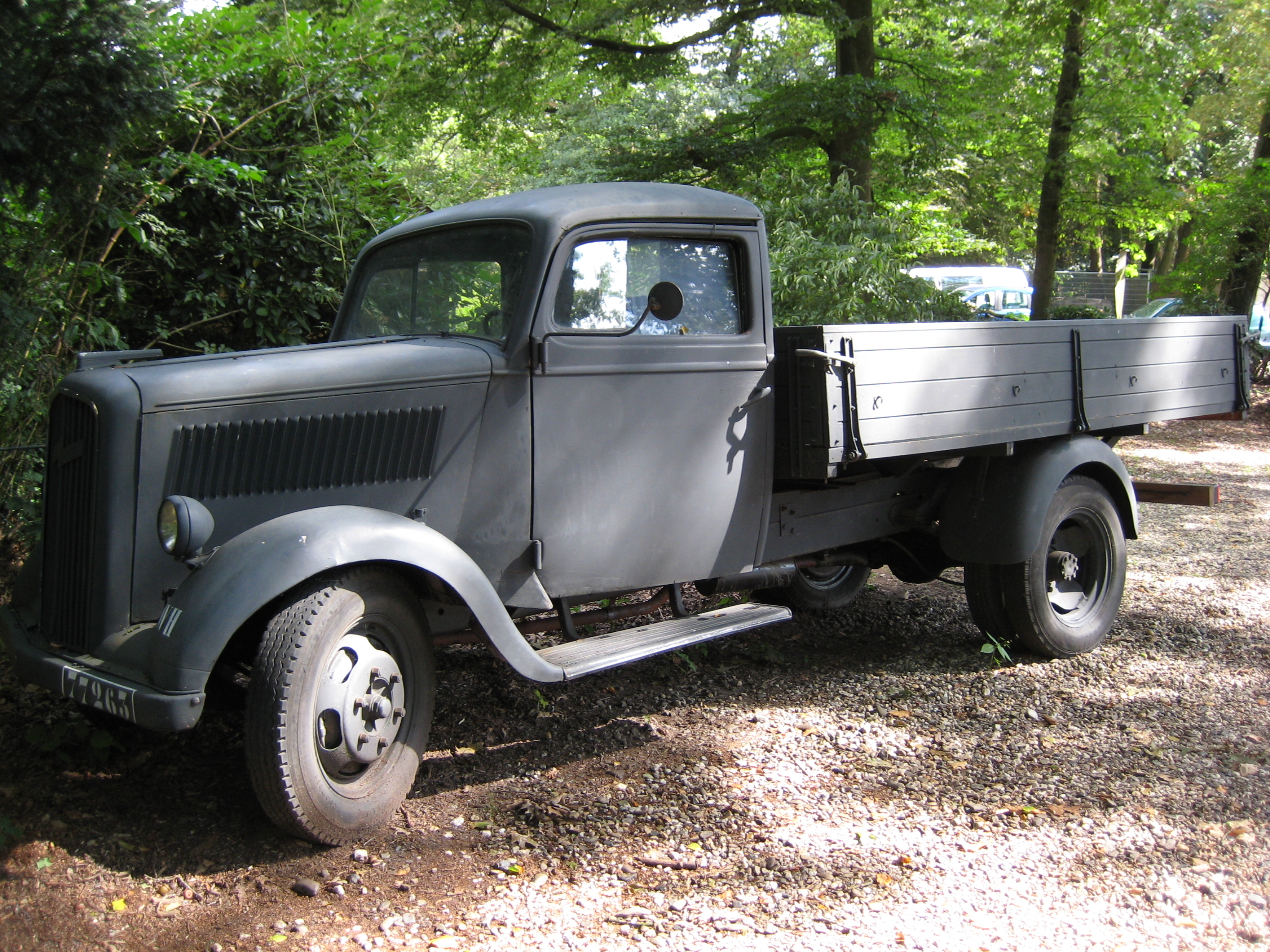 Opel Blitz at the Warmuseum in Arnhem, nld